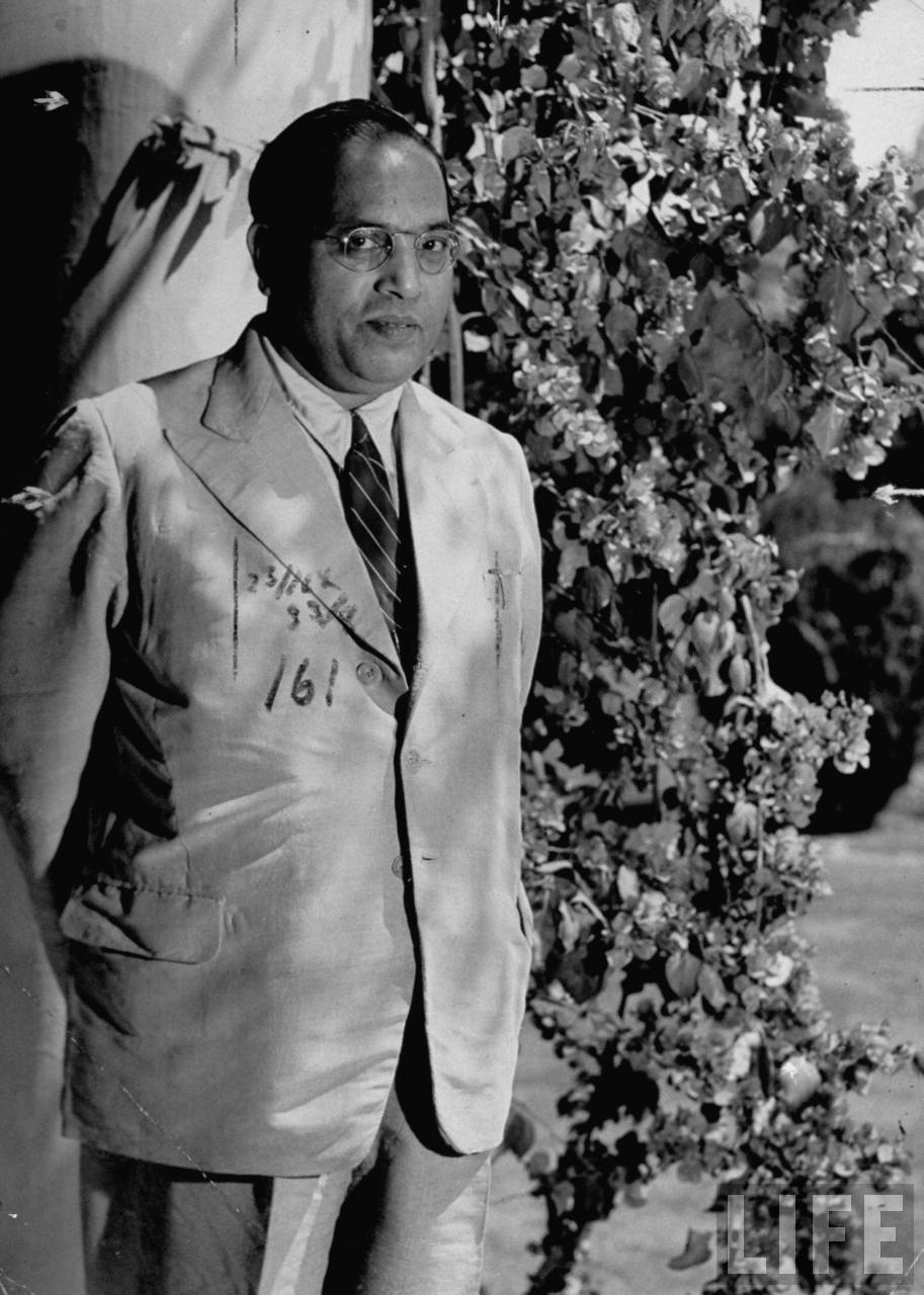 इ.स. १९४६ मध्ये राजगृहात डॉ. बाबासाहेब आंबेडकर